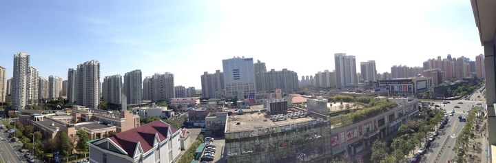 中文（中国大陆）: 联洋新社区大拇指广场全景